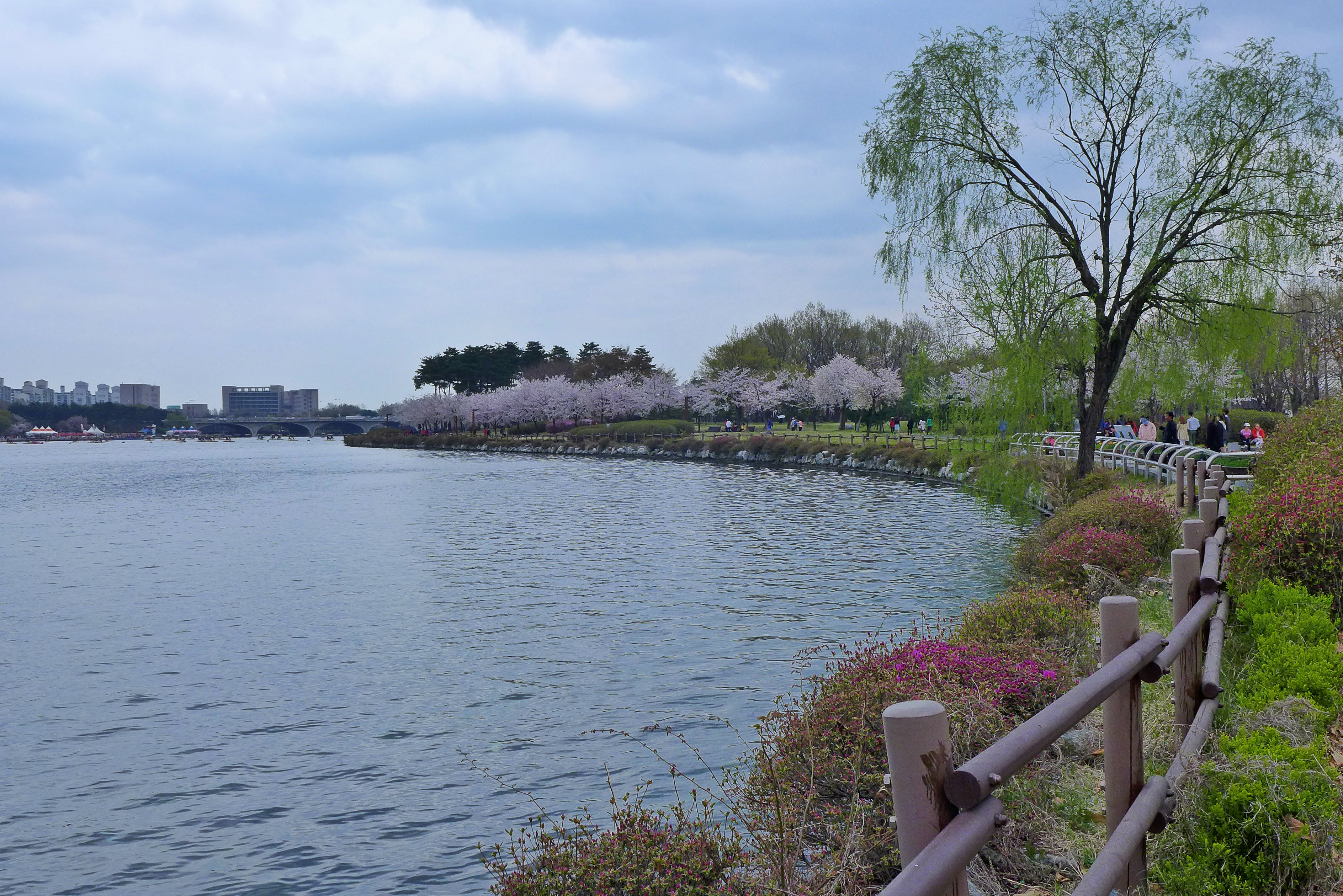 일산 호수공원